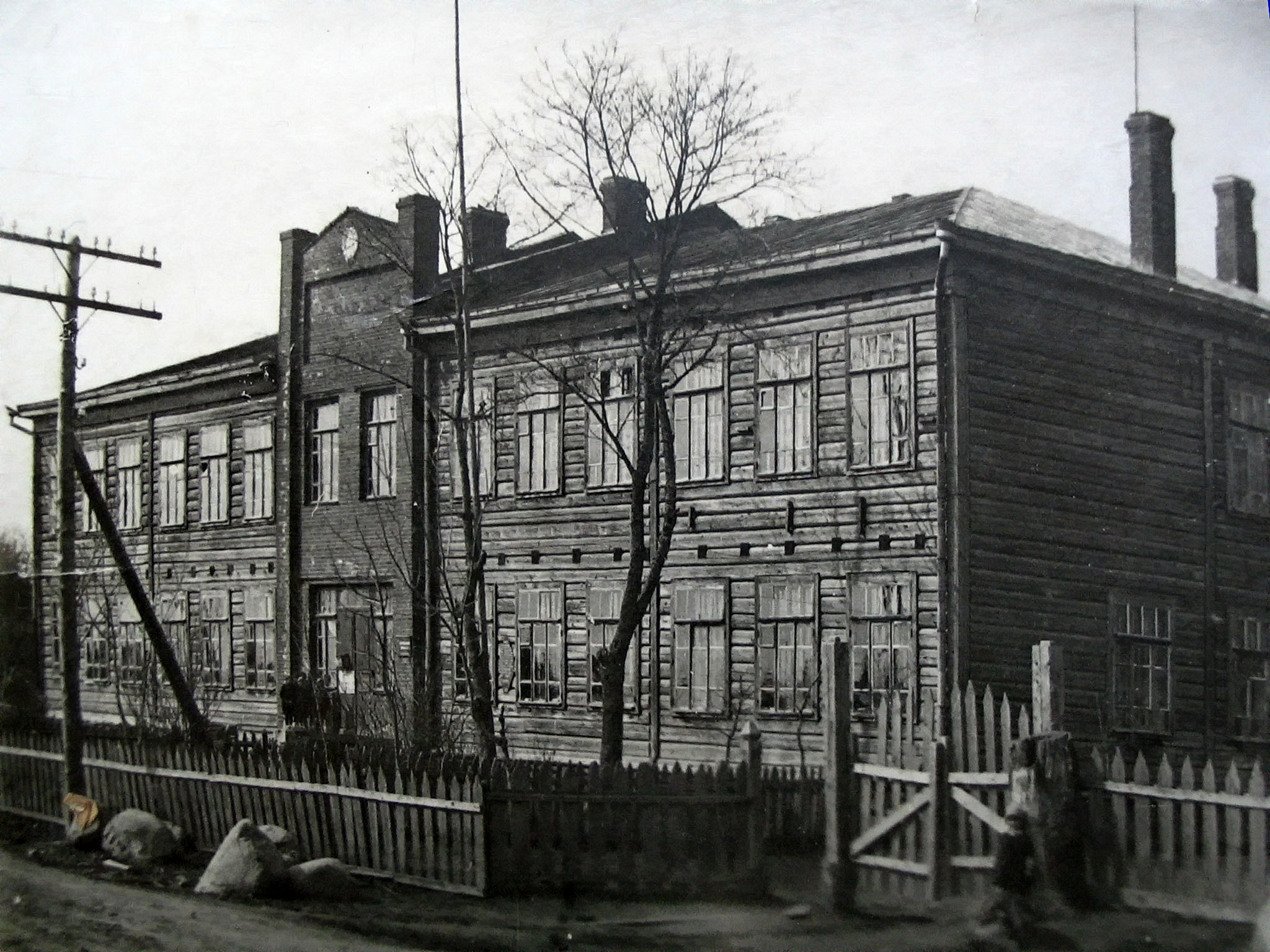 Двухэтажное здание Кохановской средней школы, сгоревшее в годы Великой Отечественной войны 1941 - 1945 гг.